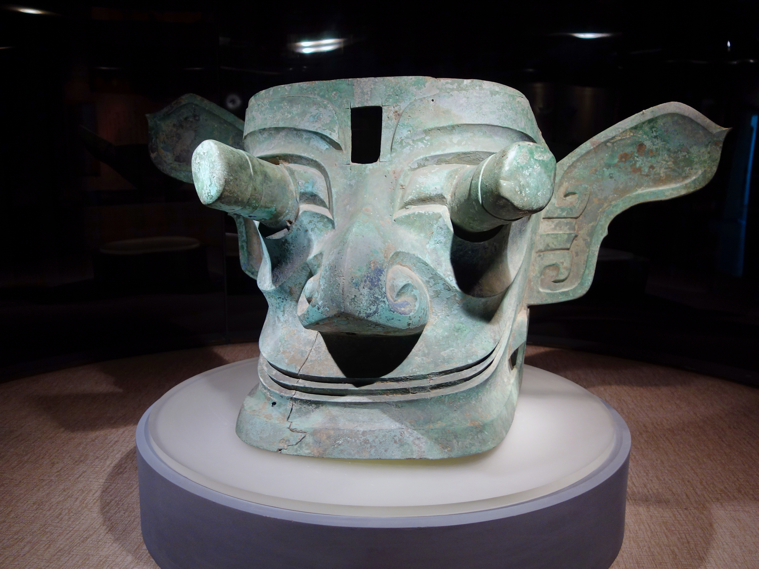 青铜纵目面具，三星堆遗址二号祭祀坑出土。其夸张的双眼呈柱状向前纵凸伸出，双耳向两侧伸展并扬起。根据古文献记载古蜀人始祖“蚕丛”的形像特征即为“其目纵”，一般认为与传说中第一代蜀王“蚕从”有关。